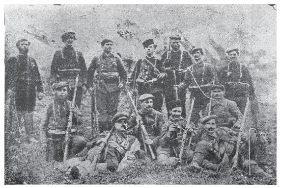 Четата на Ефрем Миладинов (? - 1915).